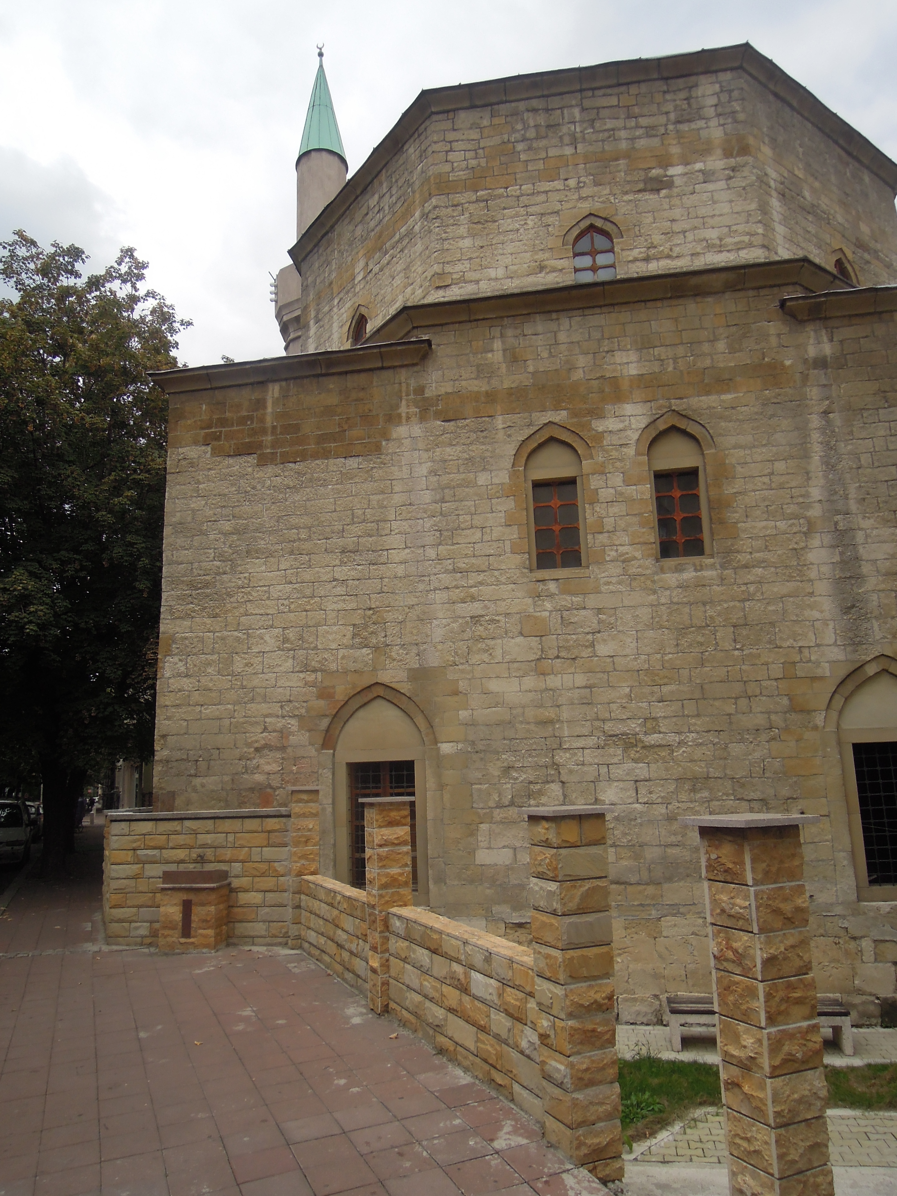 Бајракли џамија је саграђена око 1575. године, као једна од 273 џамија, колико их је у турско доба било у Београду.